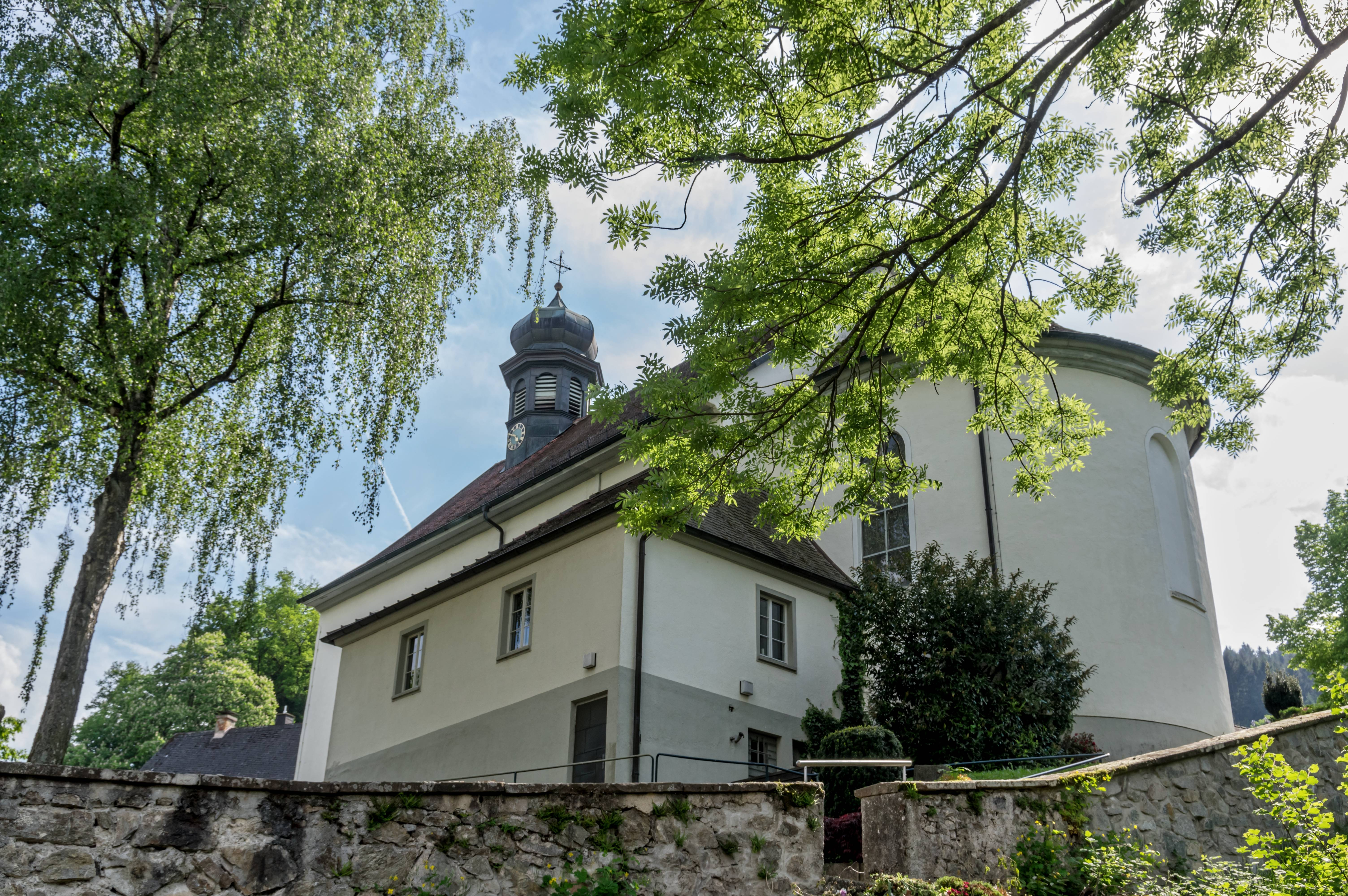 Bilder aus Freiburg von der Kirche St.Peter und Paul in Freiburg Kappel Aussenansicht der Kirche